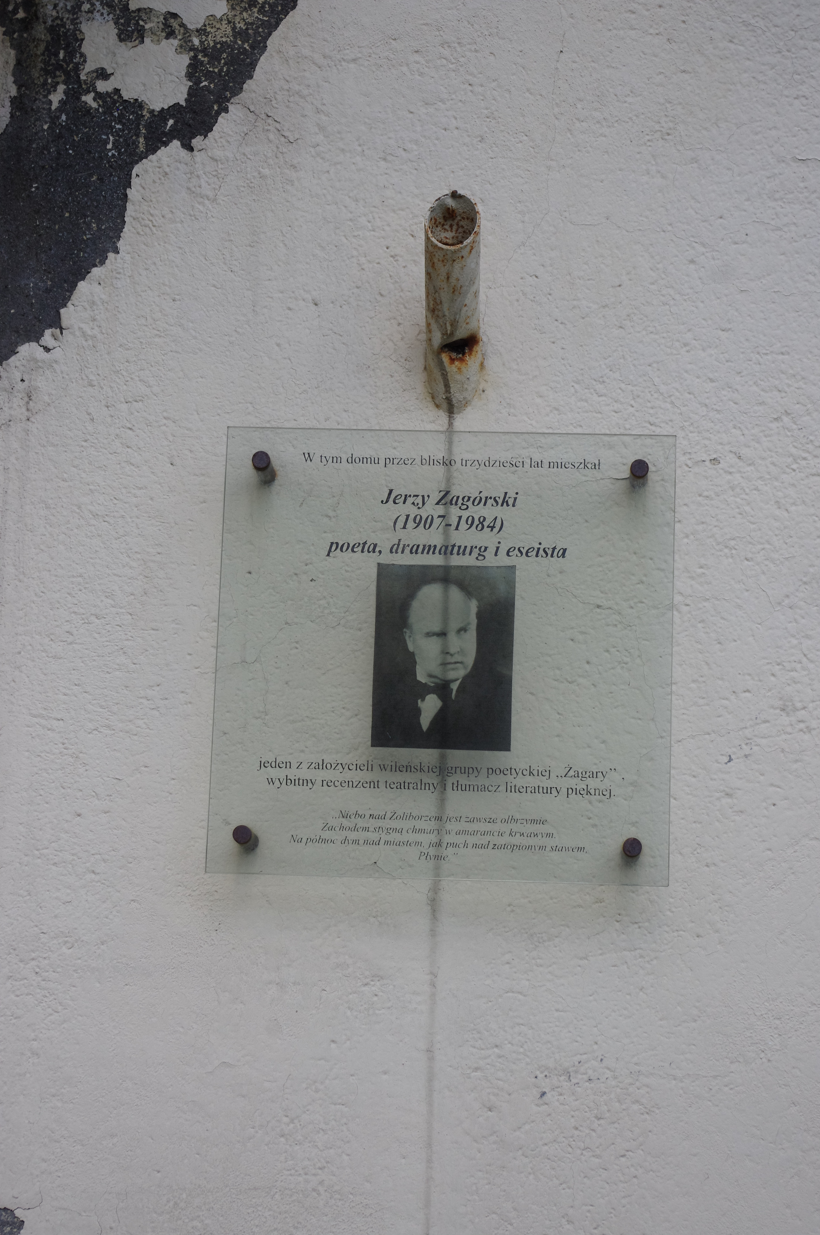 Tablica upamiętniająca Jerzego Zagórskiego na budynku przy ul. Mickiewicza 18 na Starym Żoliborzu w Warszawie, gdzie poeta mieszkał przez blisko 30-lat